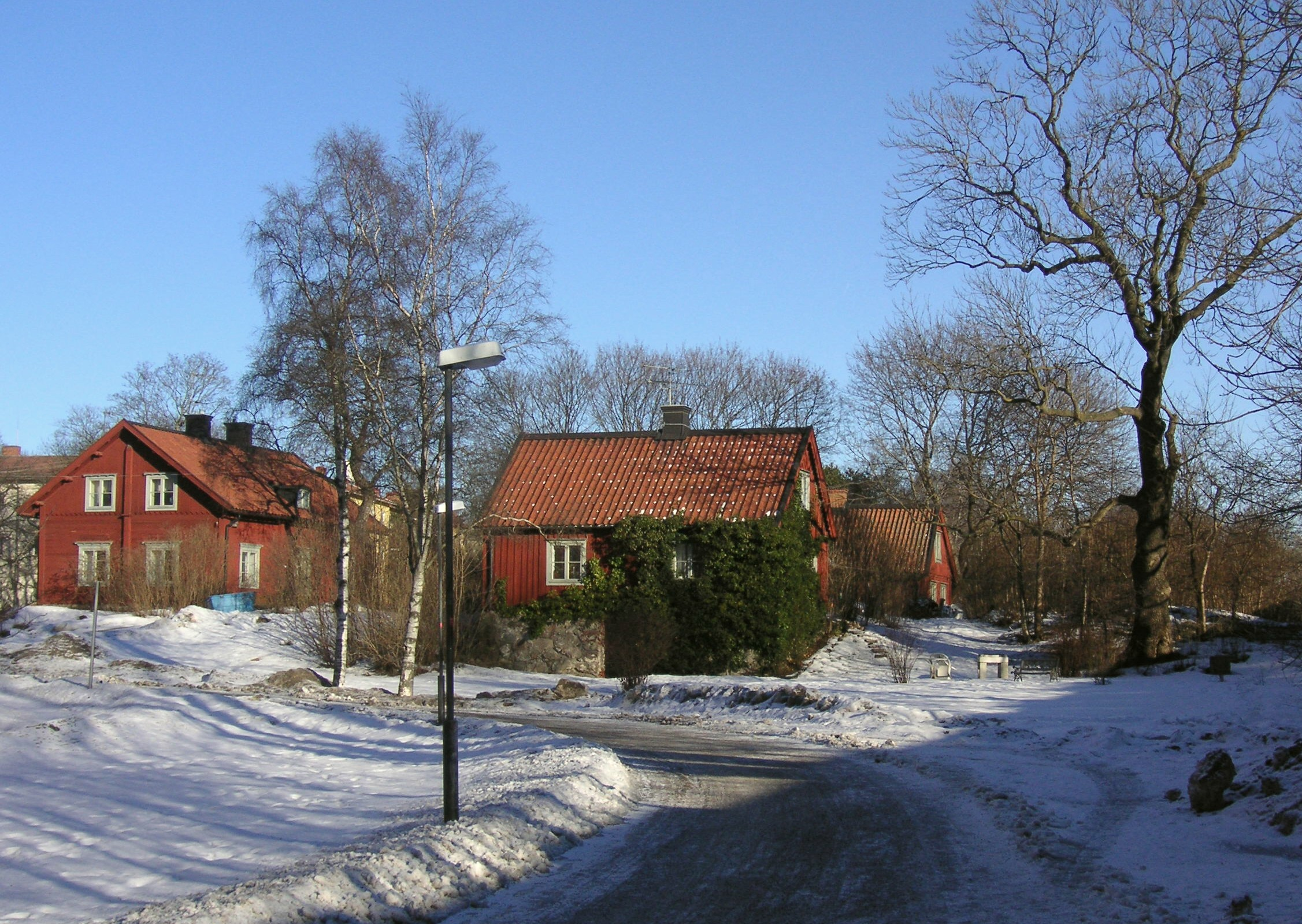 Hökmossens gård med sina flygelbyggnader